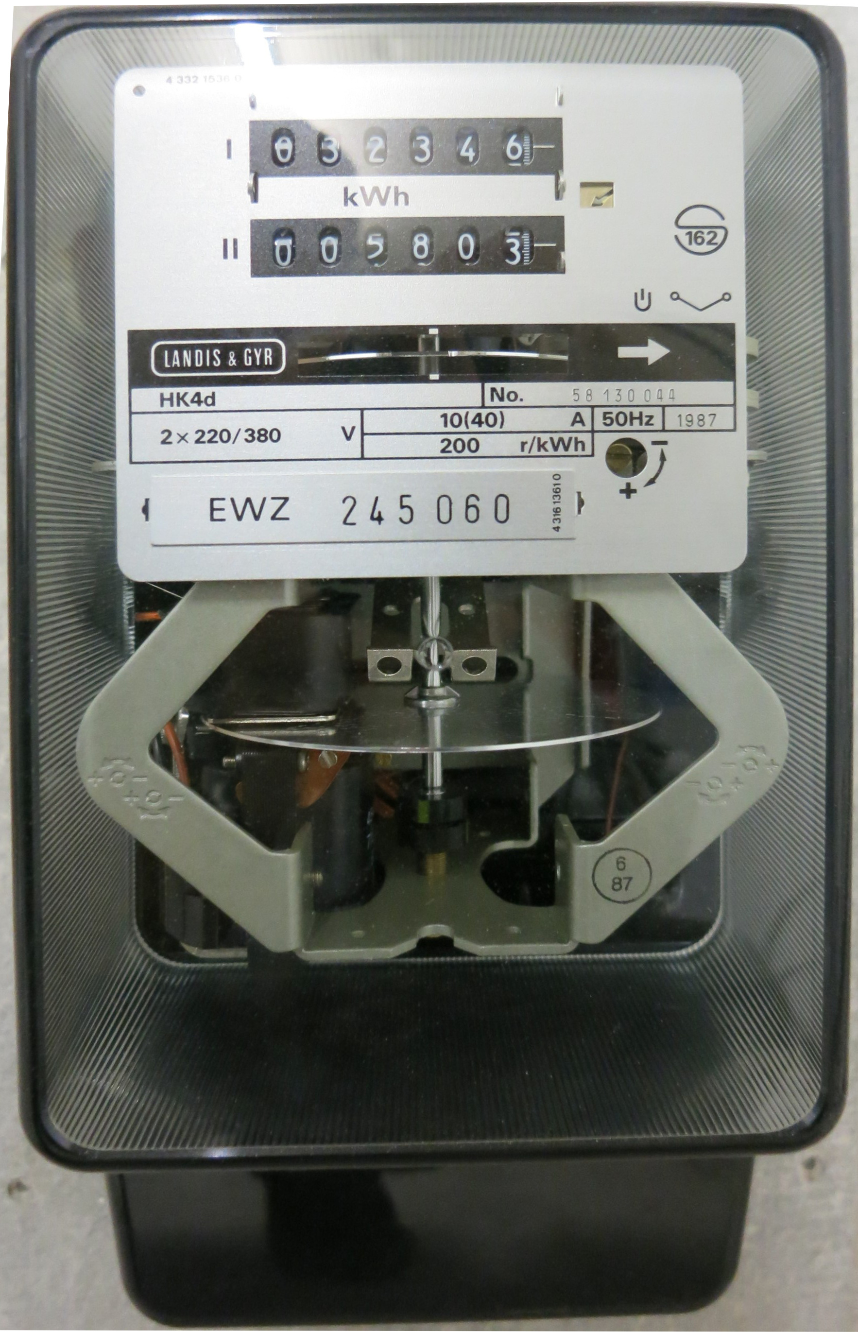 Stromzähler 1987, Landis & Gyr AG, Zug ZG, Schweiz